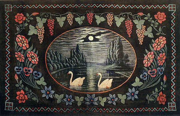 1940-я гг. Матэр'ял і тэхніка палатно, алей Памеры 135 х 193 Паходжанне Глыбоцкі р-н, Віцебская вобл. Месцазнаходжанне Гісторыка-культурны музей-запаведнік "Заслаўе"